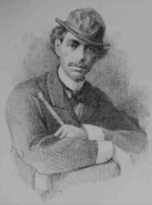 Desenho do poeta Castro Alves quando tinha 18 anos de idade, feito por Manoel Lopes Rodrigues e publicado na biografia do poeta de Múcio Teixeira.